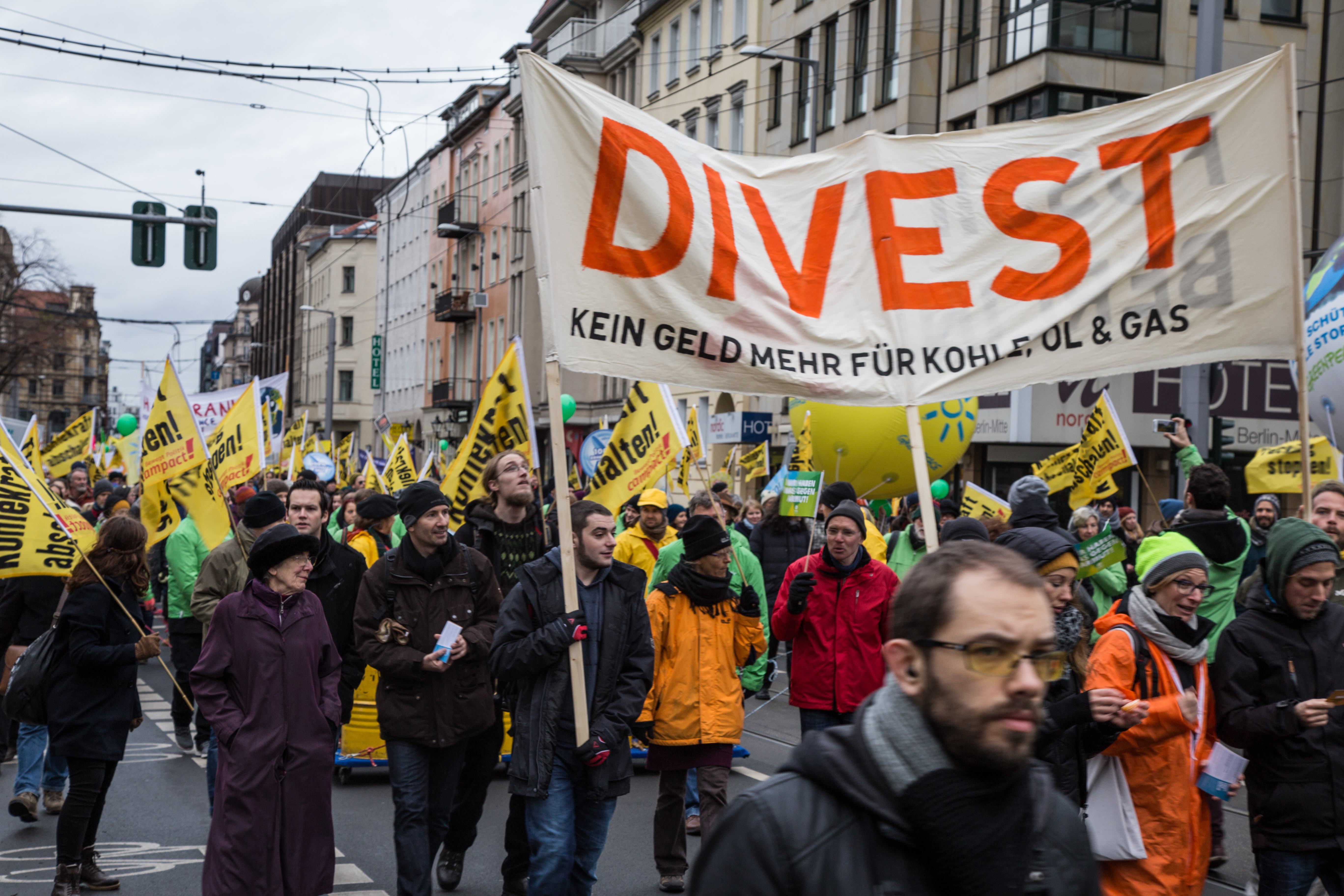 Am 29. November 2015 gingen, anlässlich der Weltklimakonferenz COP21 in Paris, ca. 17.000 Menschen in Berlin auf die Straße um auf dem weltweit stattfindenden Global Climate March für echten Klimaschutz zu demonstrieren. Trägerkreis des Protests in Deutschland waren Avaaz, Campact, Greenpeace, Klima-Allianz, NABU, Oxfam & WWF.